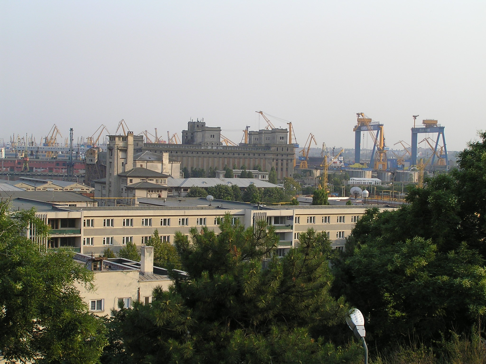 Port of Constanţa